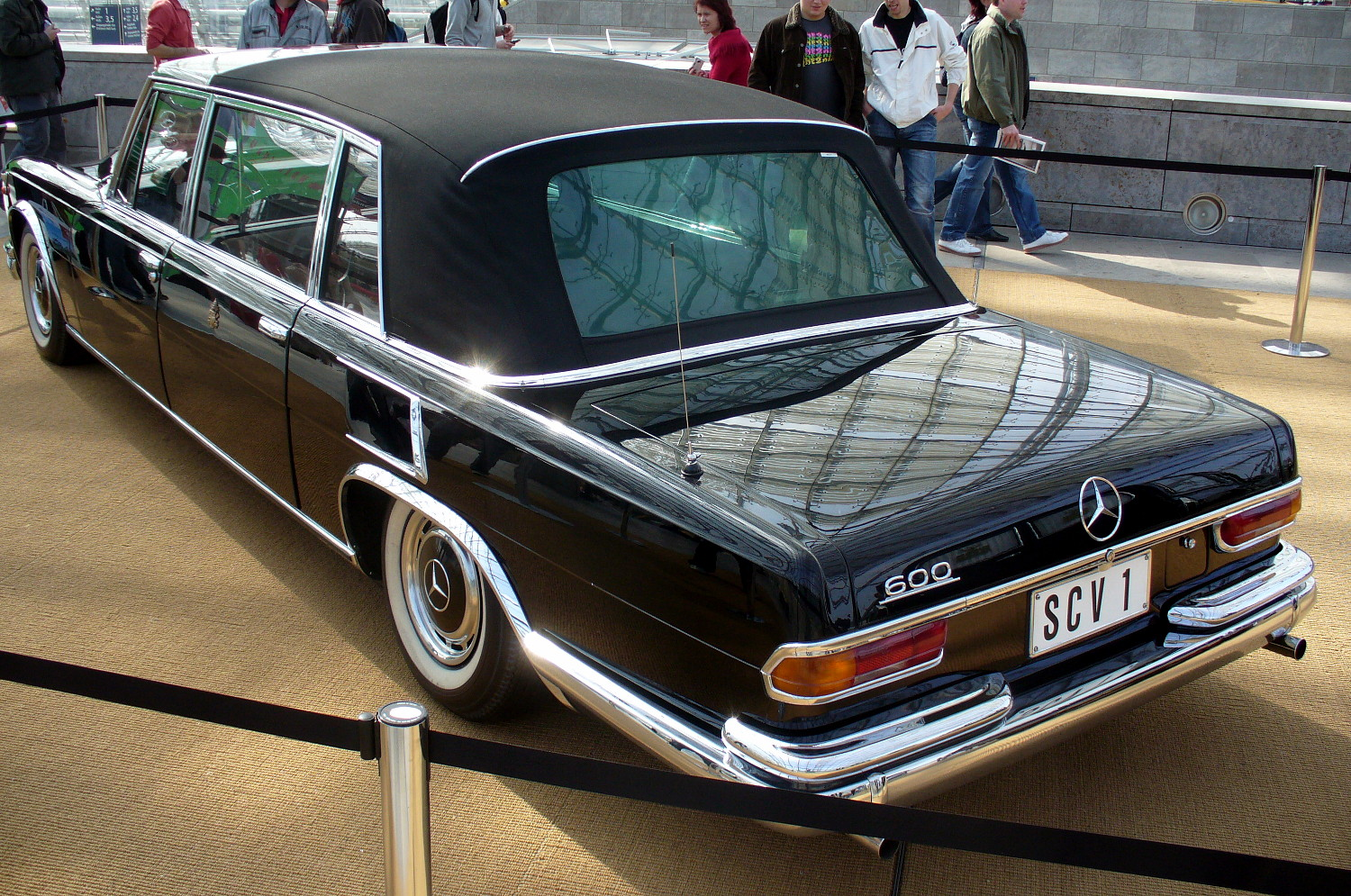 Mercedes-Benz 600 Landaulet